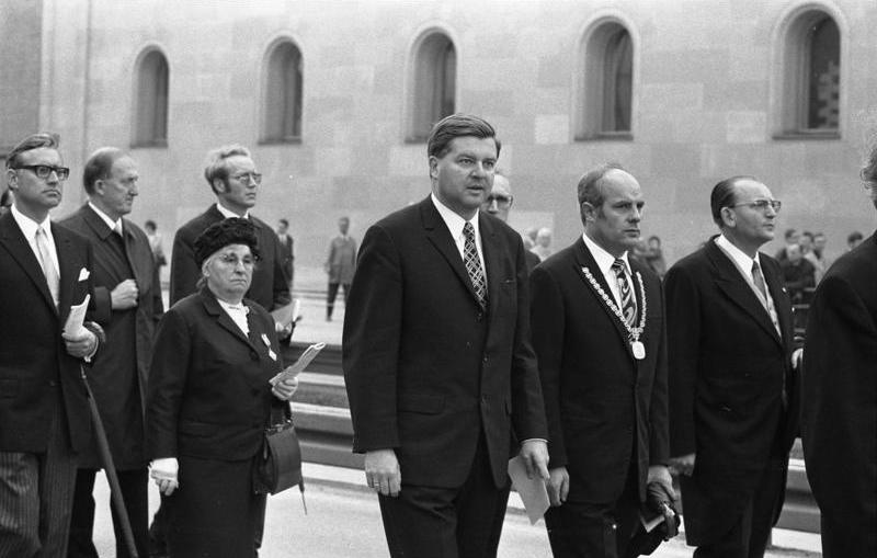 München Fronleichnamsprozession auf der Ludwigstrasse (3.v. rechts: Kultusmin. Maier, Bayern)